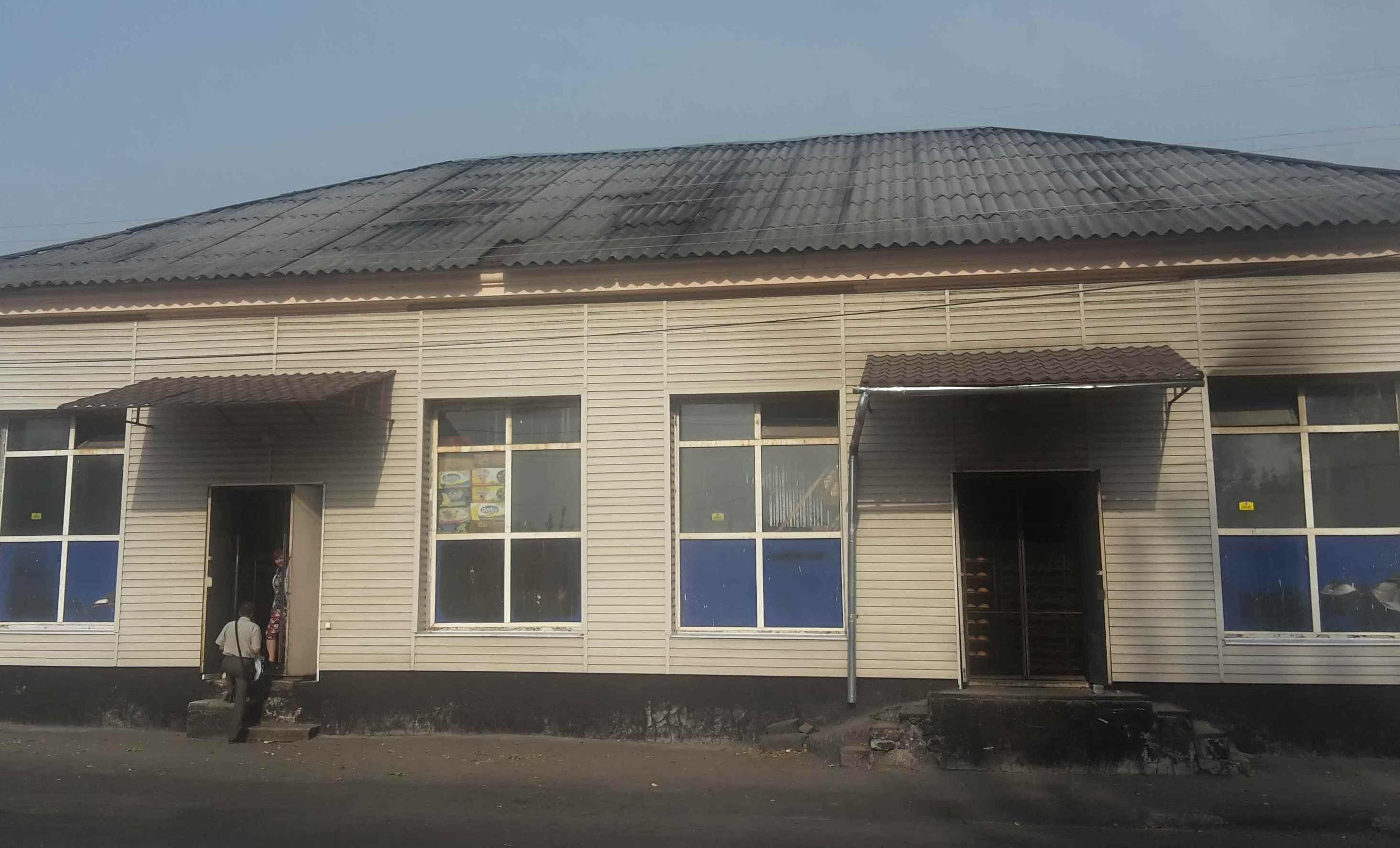 Здание бывшего театра Корсо в Кременчуге (Украина).